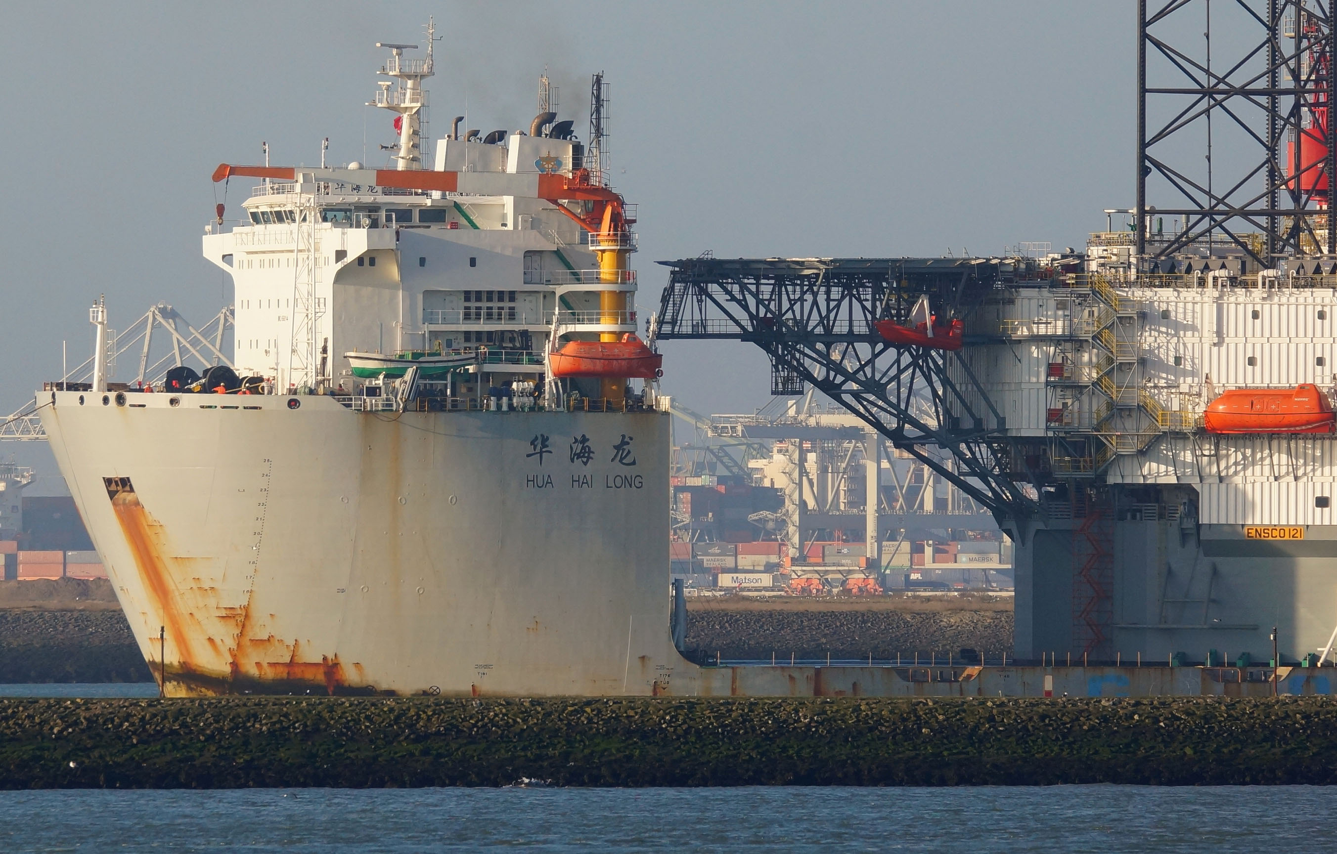 Calandkanaal 16-3-2014